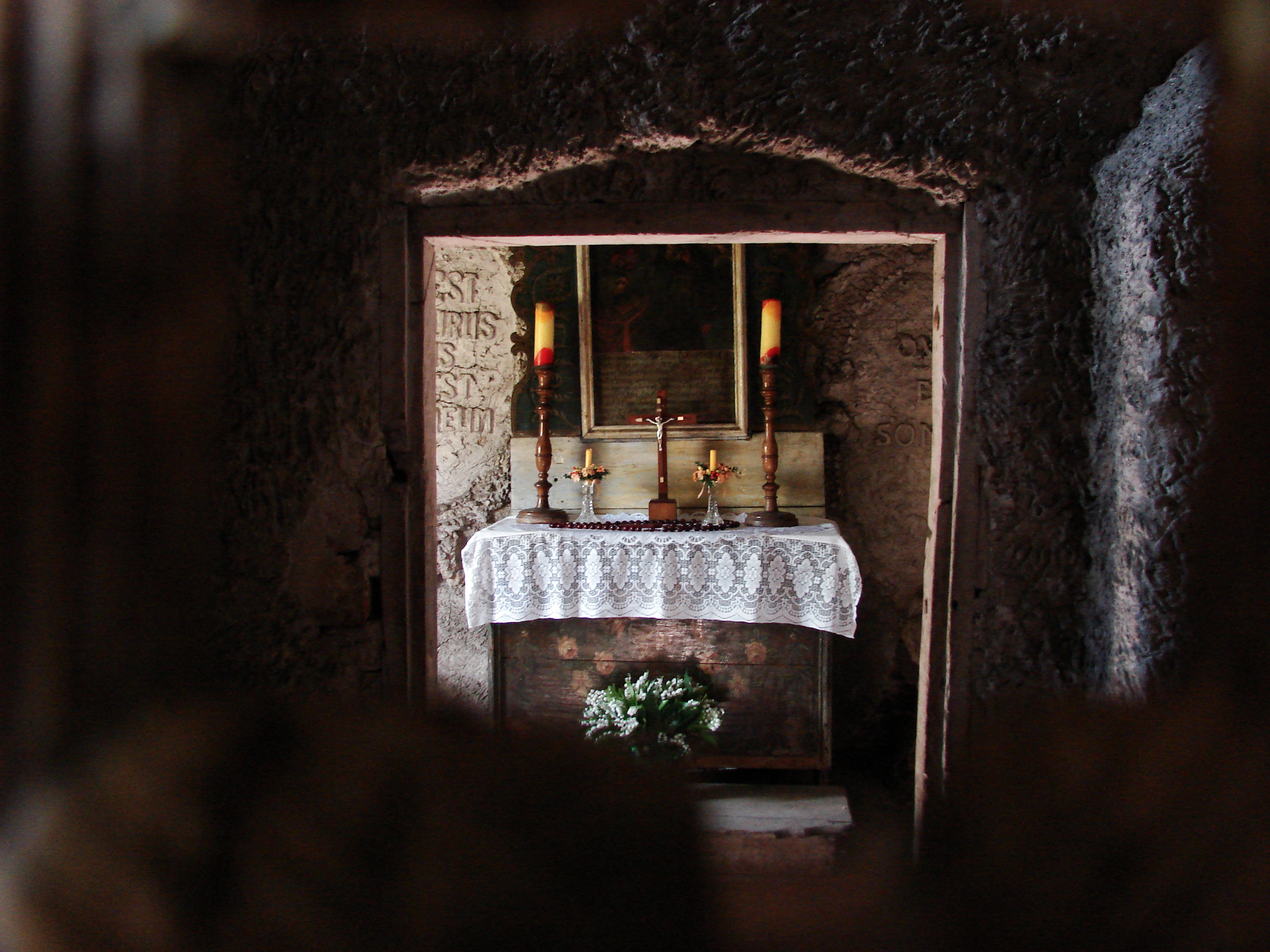 Grodzisko na zachód od Skały - Groty Modlitewne - Prawa grota